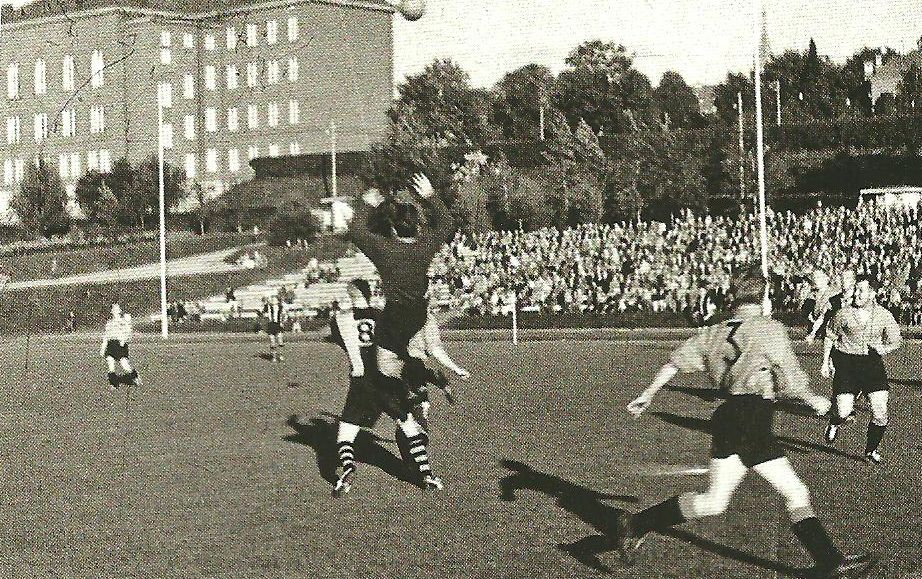 LPM-Reipas kaudella 1960